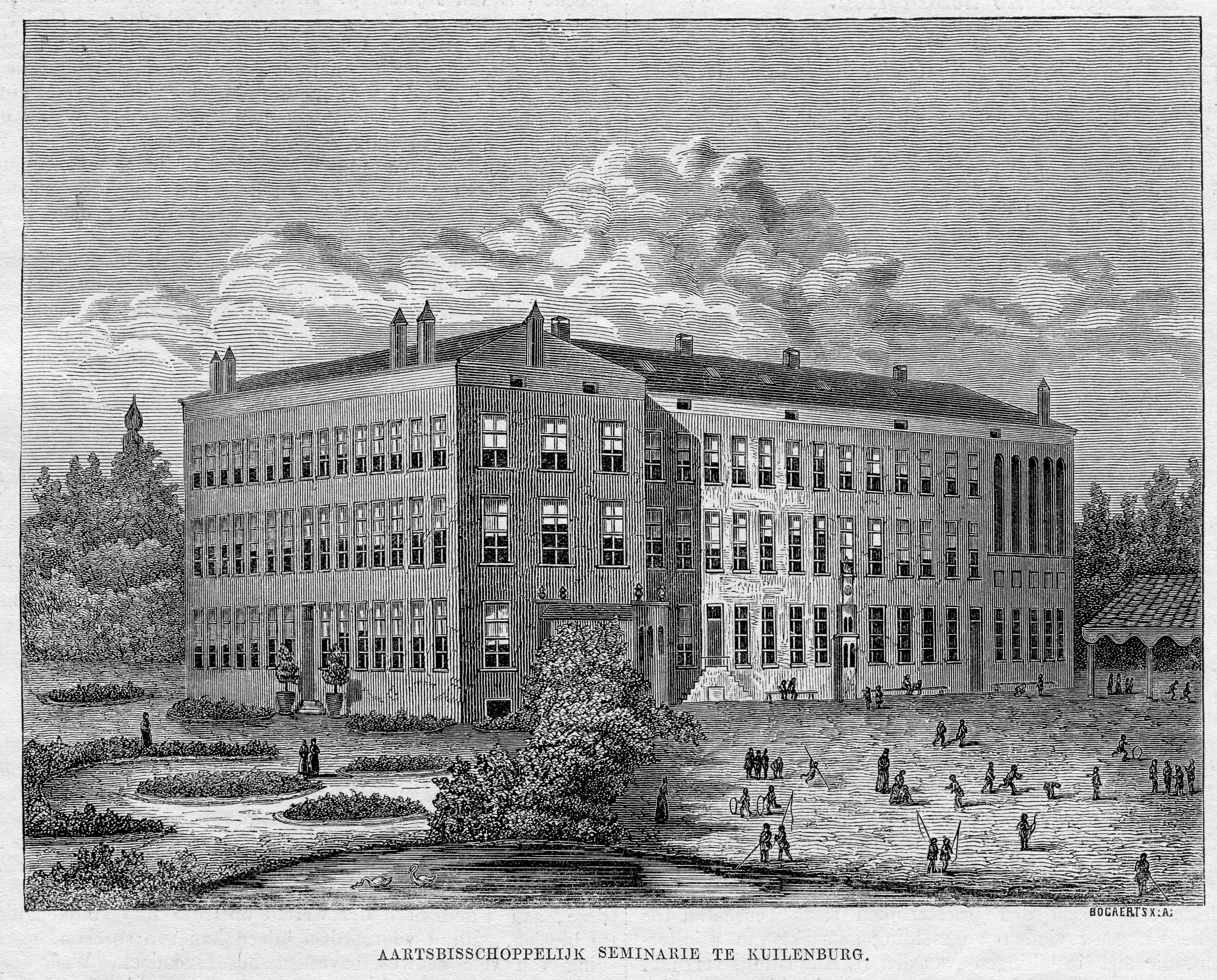 Kath. Illustratie 1869-1870 nr 46 p.368 Aartsbisschoppelijk seminarie te Kuilenburg